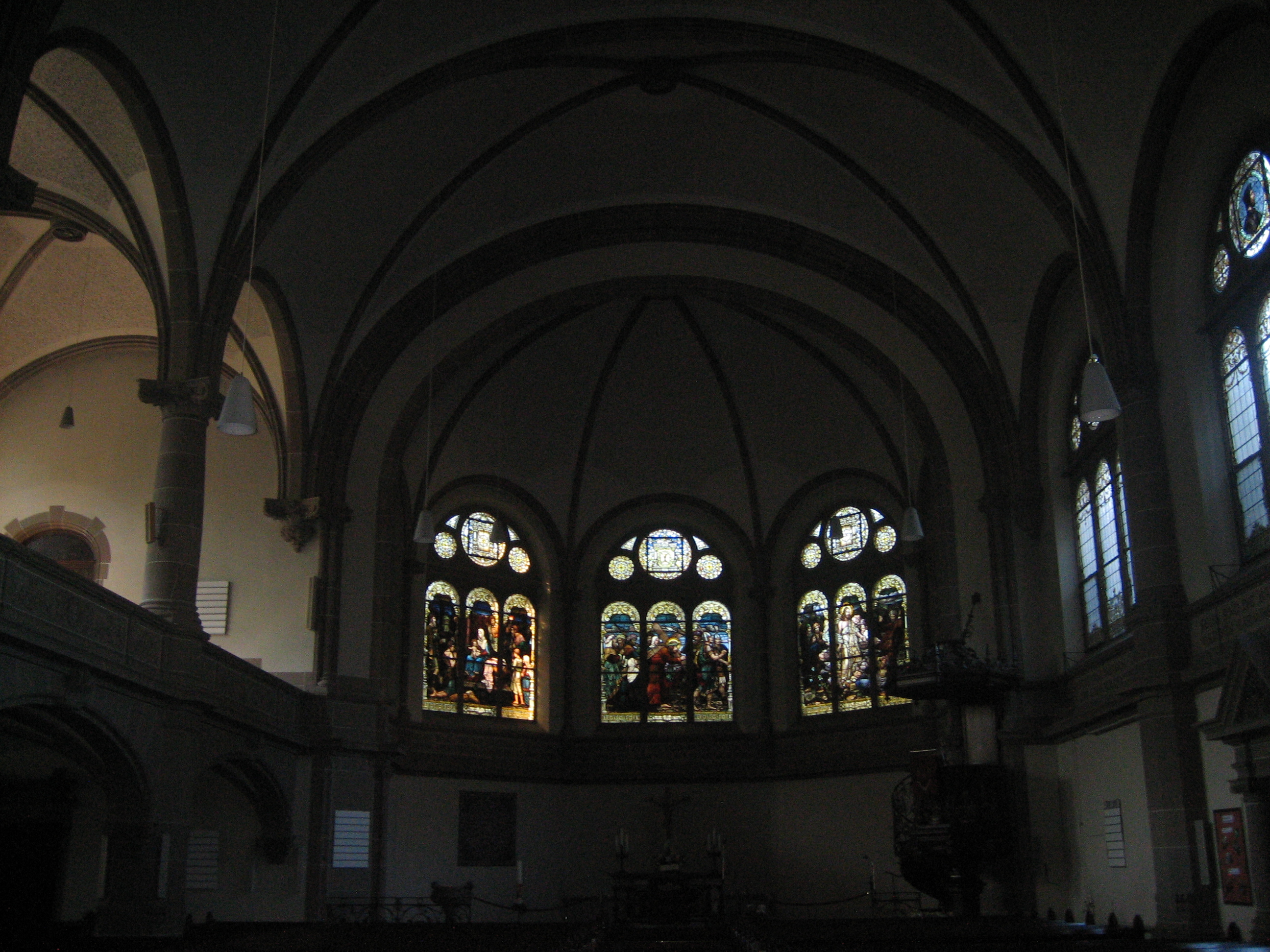 Christuskirche Innen